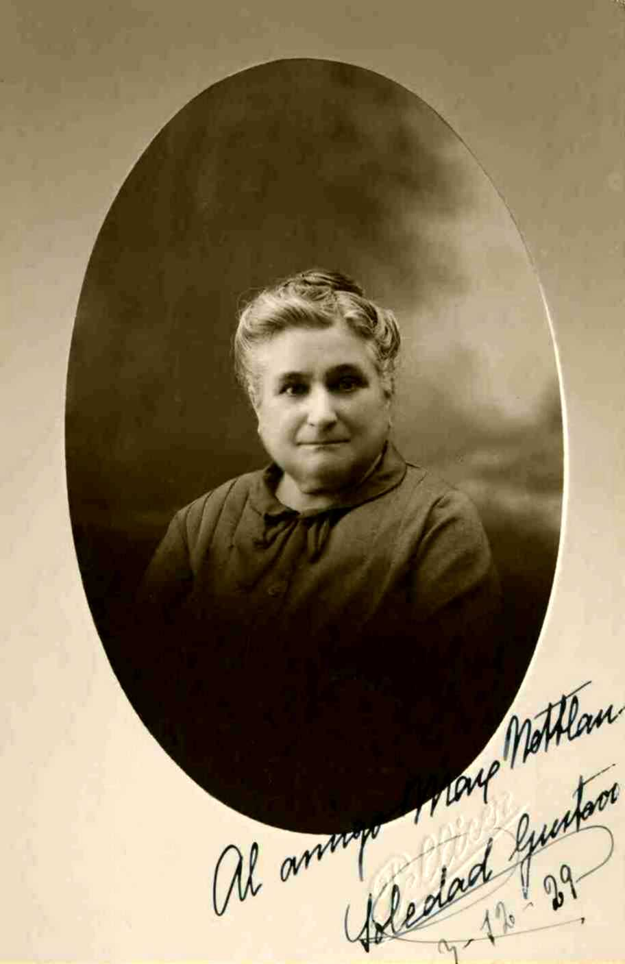 Soledad Gustavo, de son vrai nom Teresa Mañé Miravet né le 29 novembre 1865 à Cubells (Catalogne) et morte le 5 février 1939 à Perpignan (France), est une professeure, éditrice et écrivain libertaire et féministe.